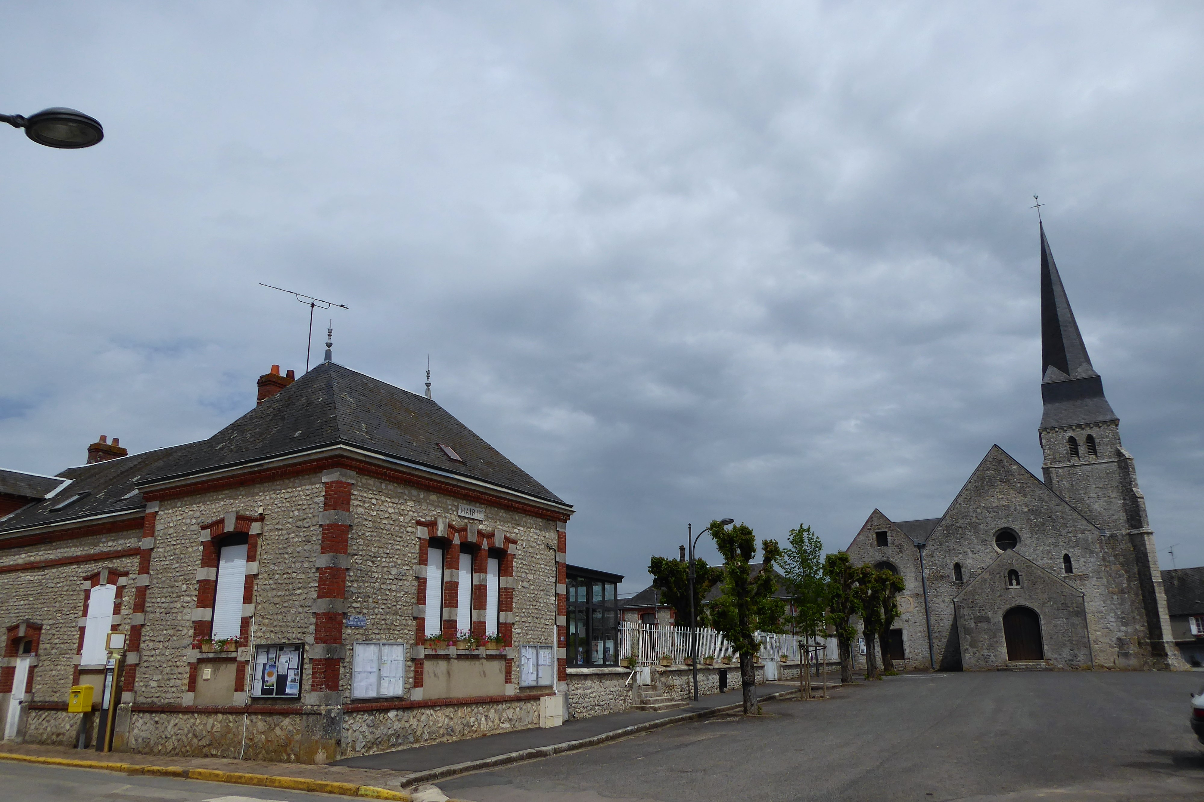 mairie et église Saint-Saturnin d'Ymonville, Eure-et-Loir, France.